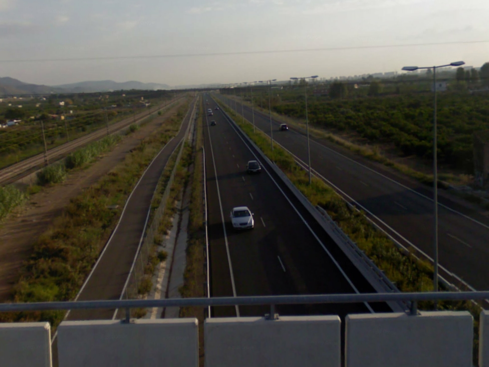 Imagen de la carretera CV-149 en Castellón, España